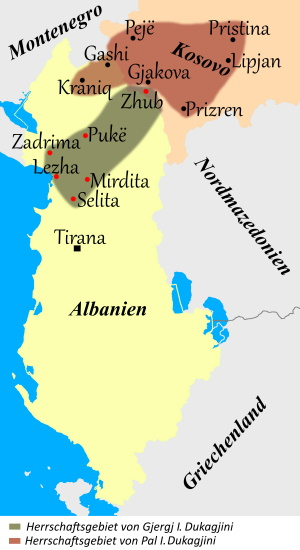 Ungefähre Lage der Herrschaftsgebiete von Pal I. und Gjergj I. Dukagjini im Jahr 1356